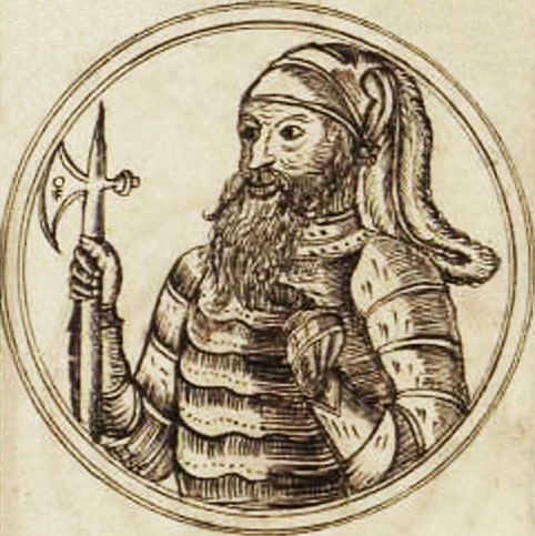 Беларуская (тарашкевіца): Уяўны партрэт вялікага князя Траняты